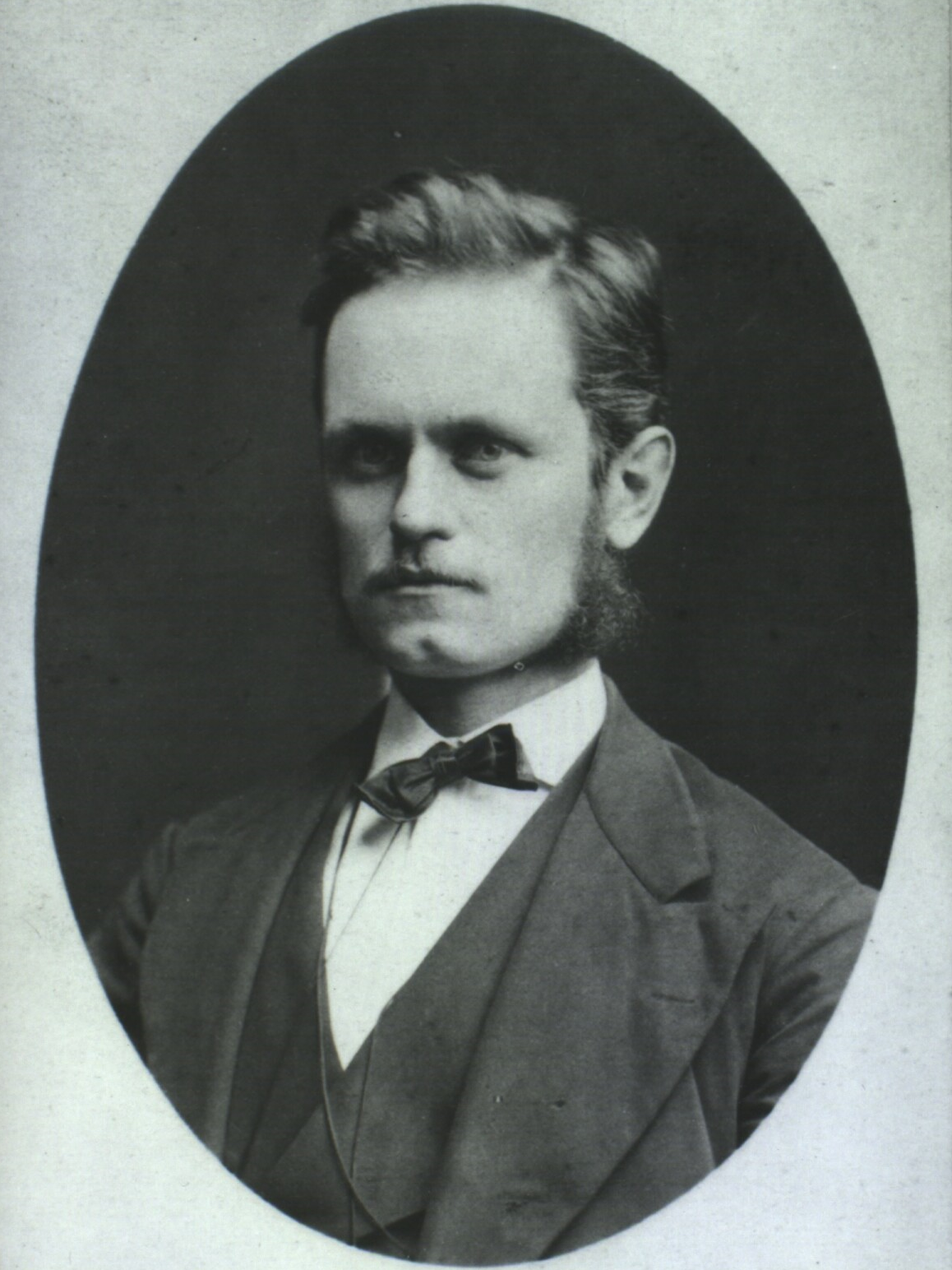 Hans Zahrtmann 1877 Det Kgl. Biblioteks billedsamling, dort lizensiert als CC BY-NC-ND 3.0